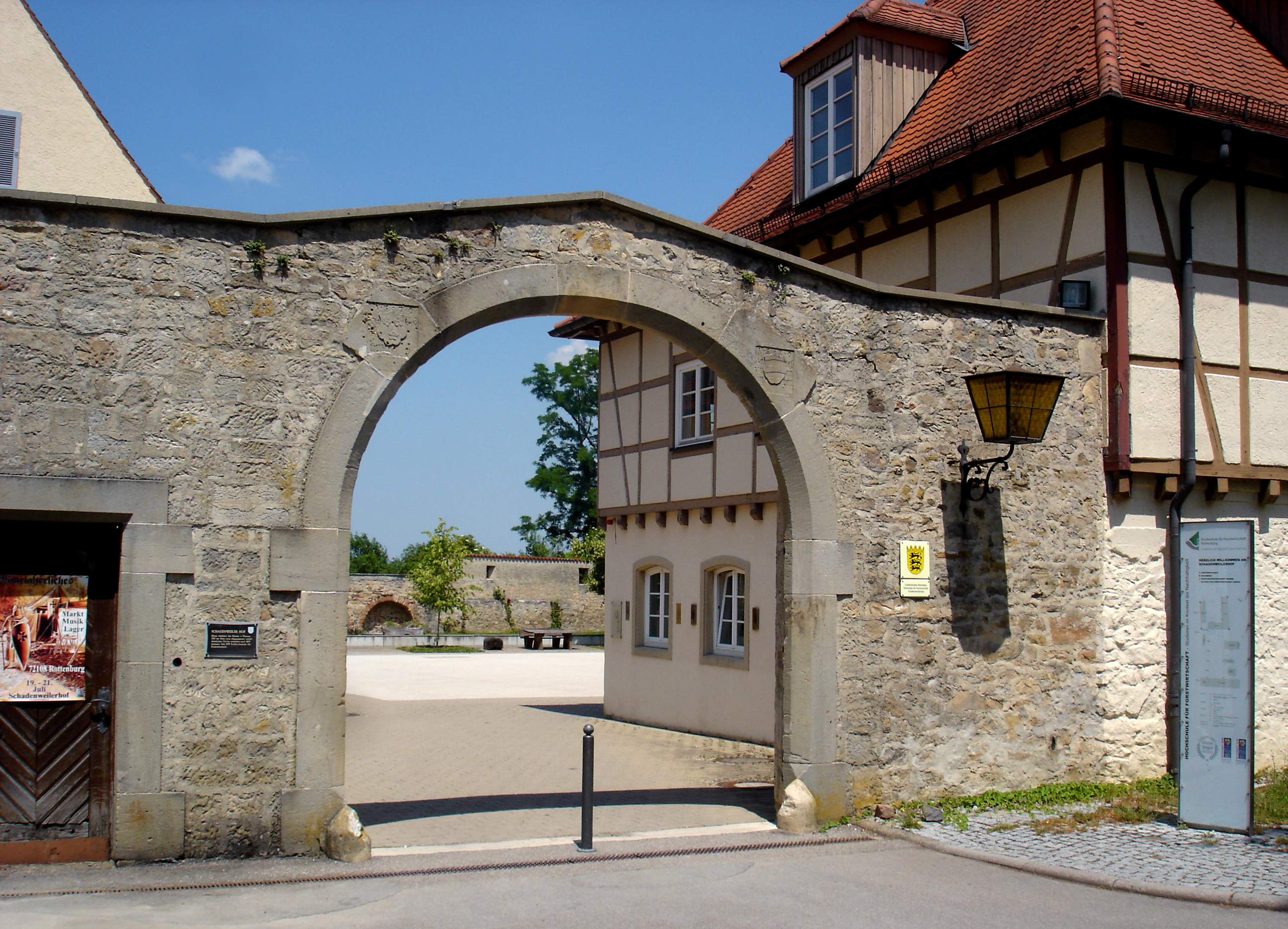 Schadenweiler Hof, Rottenburg am Neckar